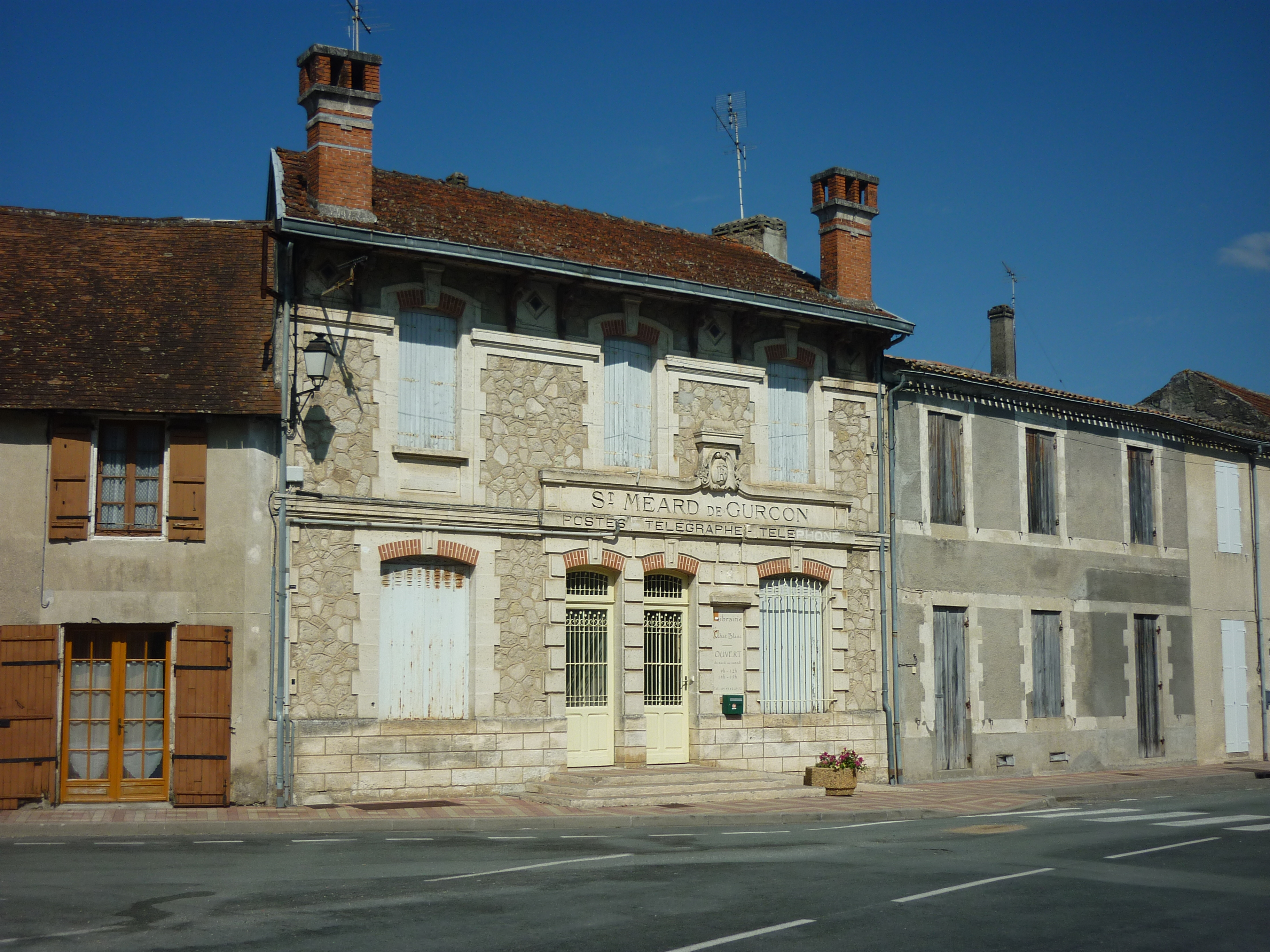 Poste de Saint-Méard-de-Gurçon (Dordogne).